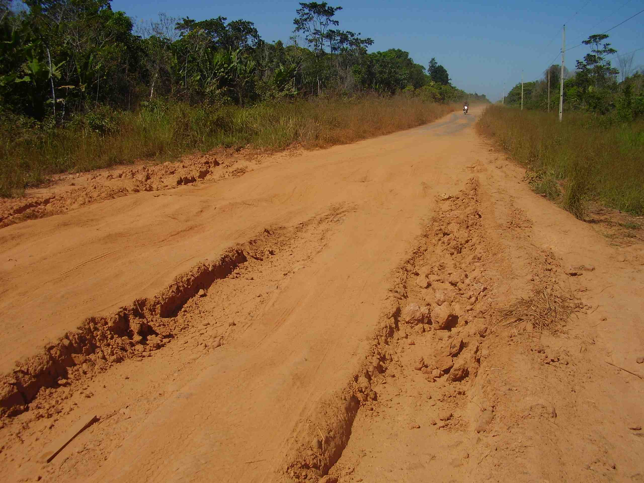 BR-319